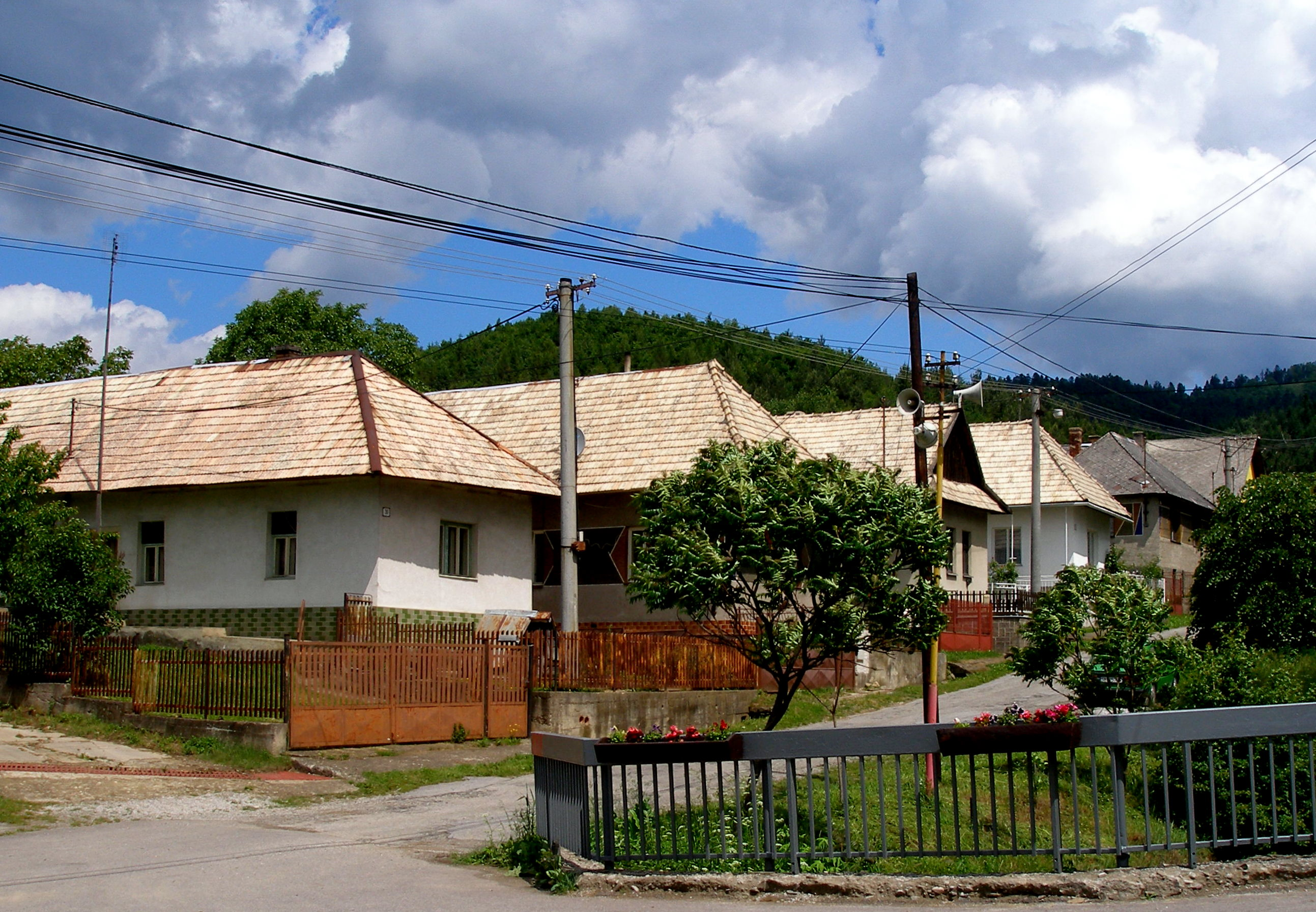 Obec Jakovany okres Sabinov.